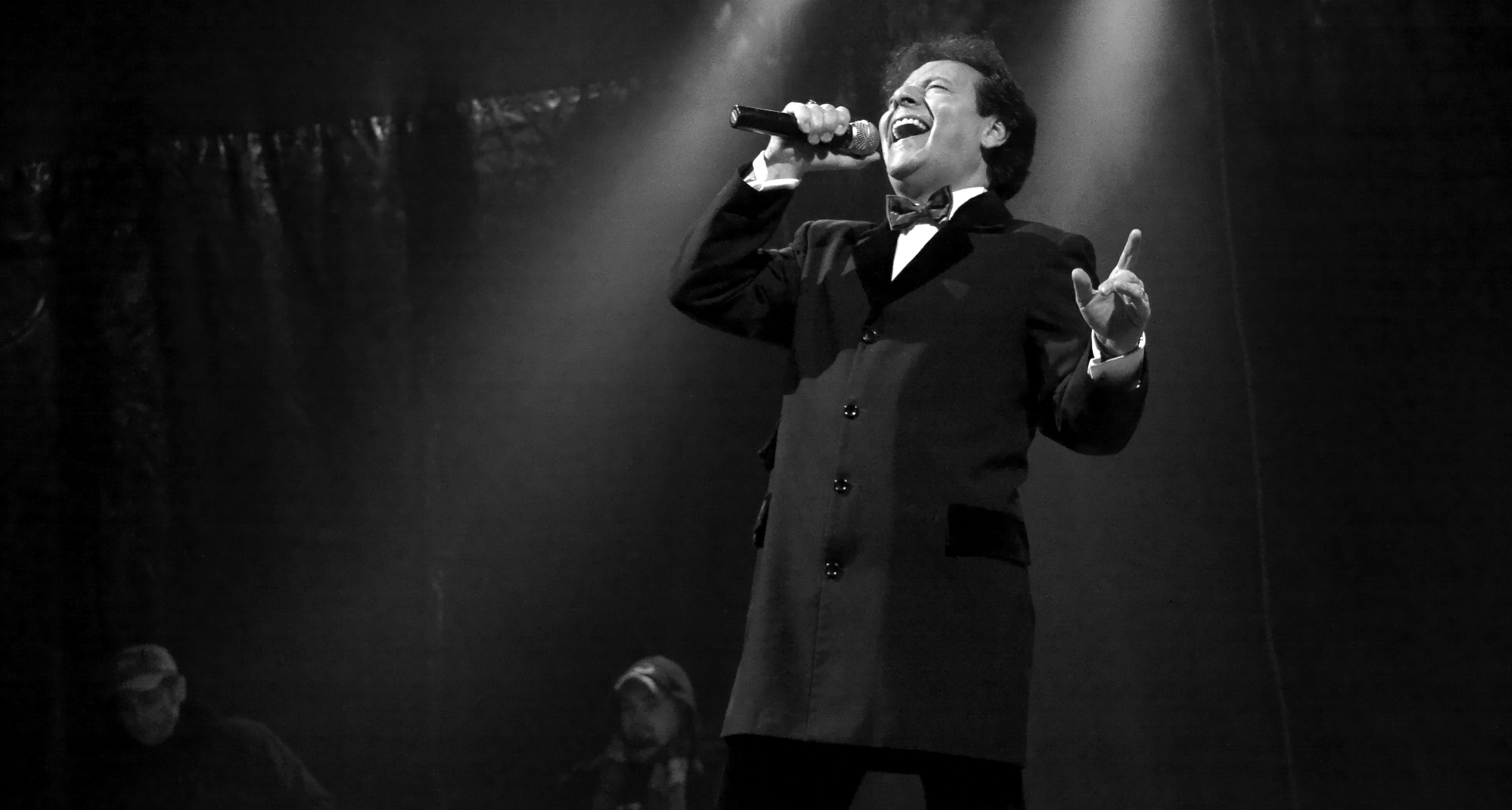 Koncert Sylwestrowy w Ostrowcu Świętokrzyskim